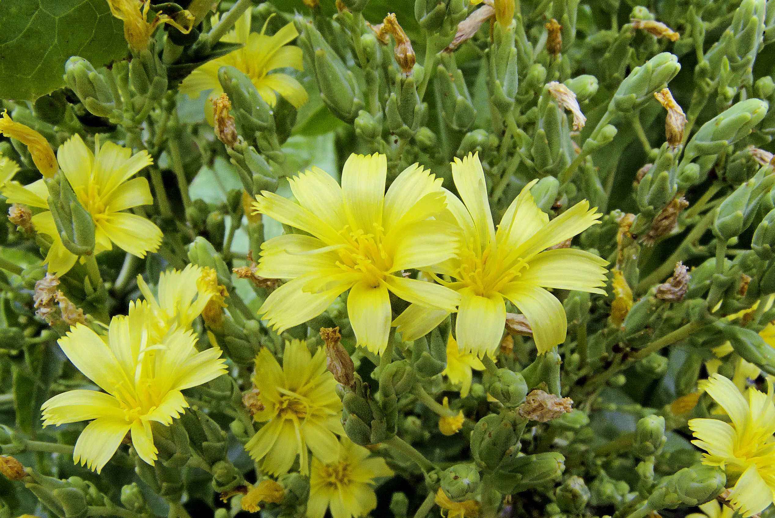 Lactuca sativa, botersla